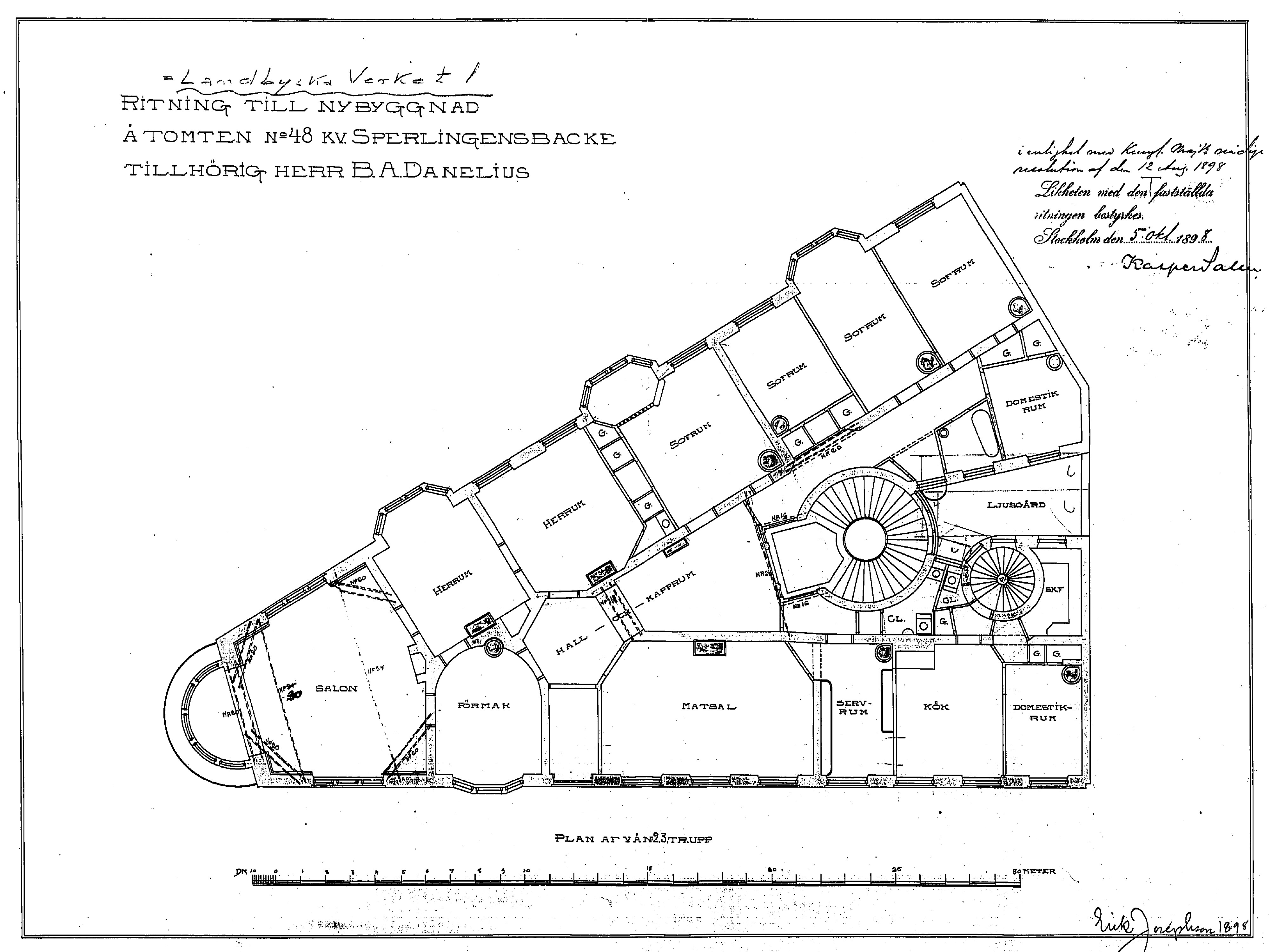 Daneliuska huset, ritning, 2 och 3 trappor